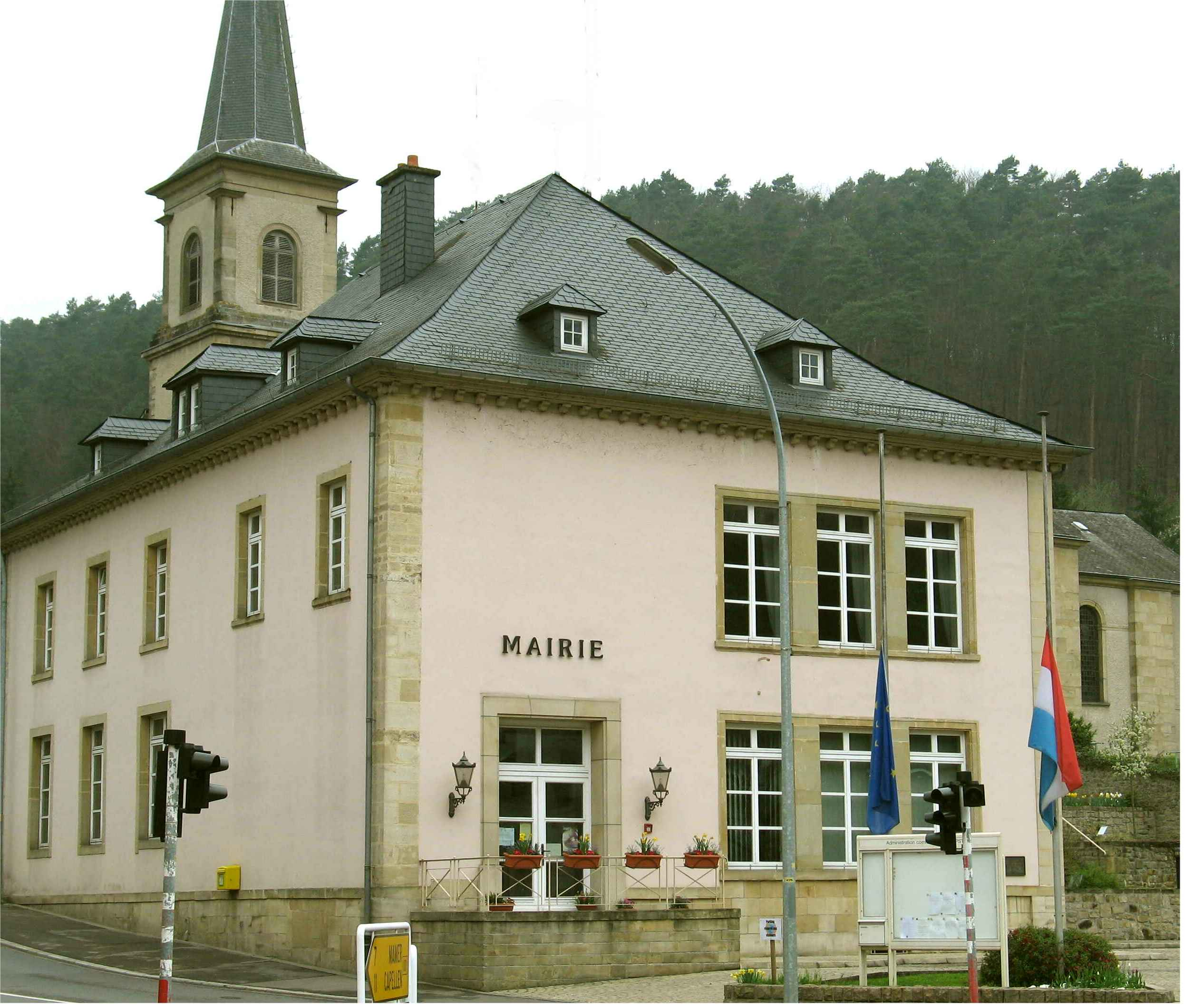 D'Gemeng vu Koplescht. Kategorie:Gemeng Koplescht